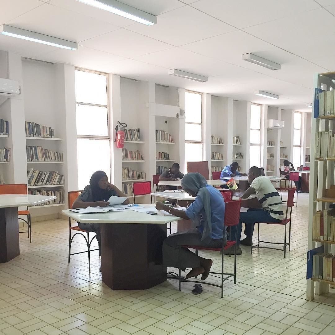 via Instagram ift.tt/2iHwnEg